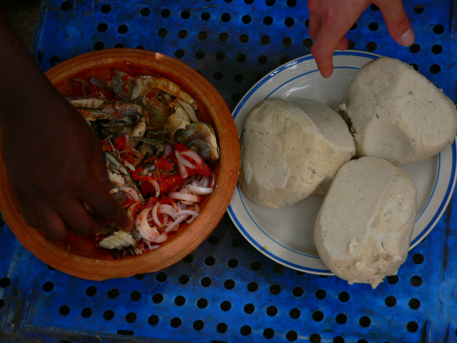 Banku ne mako